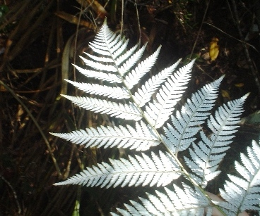 Envés de una fronda de ampe o palmilla (Lophosoria quadripinnata) en la Reserva Nacional Contulmo, Región de la Araucanía, Chile